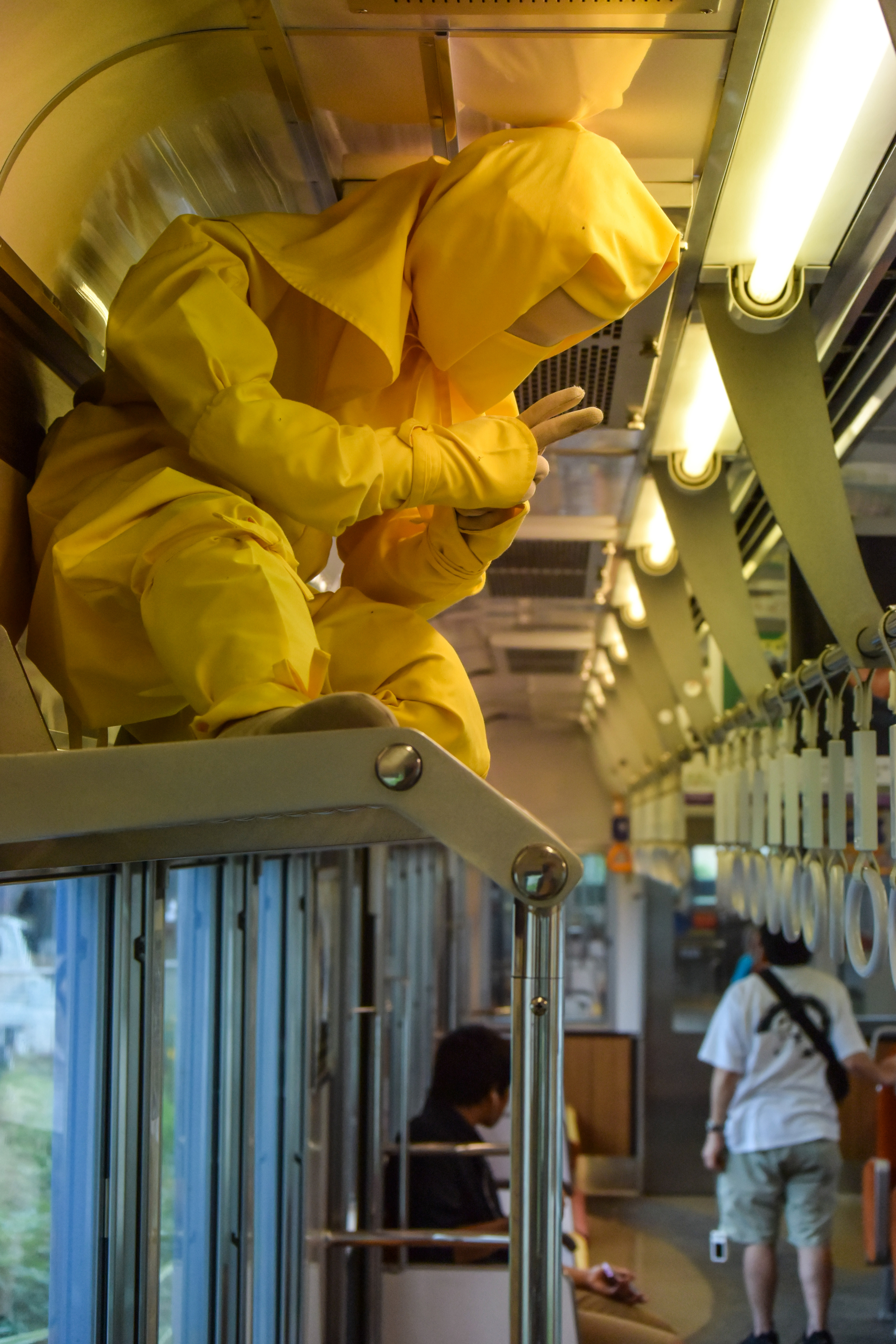 Jun 28, 2014 at 14:26, Mie 伊賀線